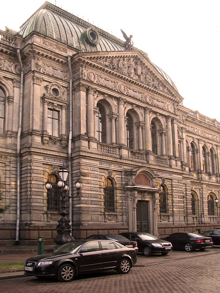 Шикарное здание